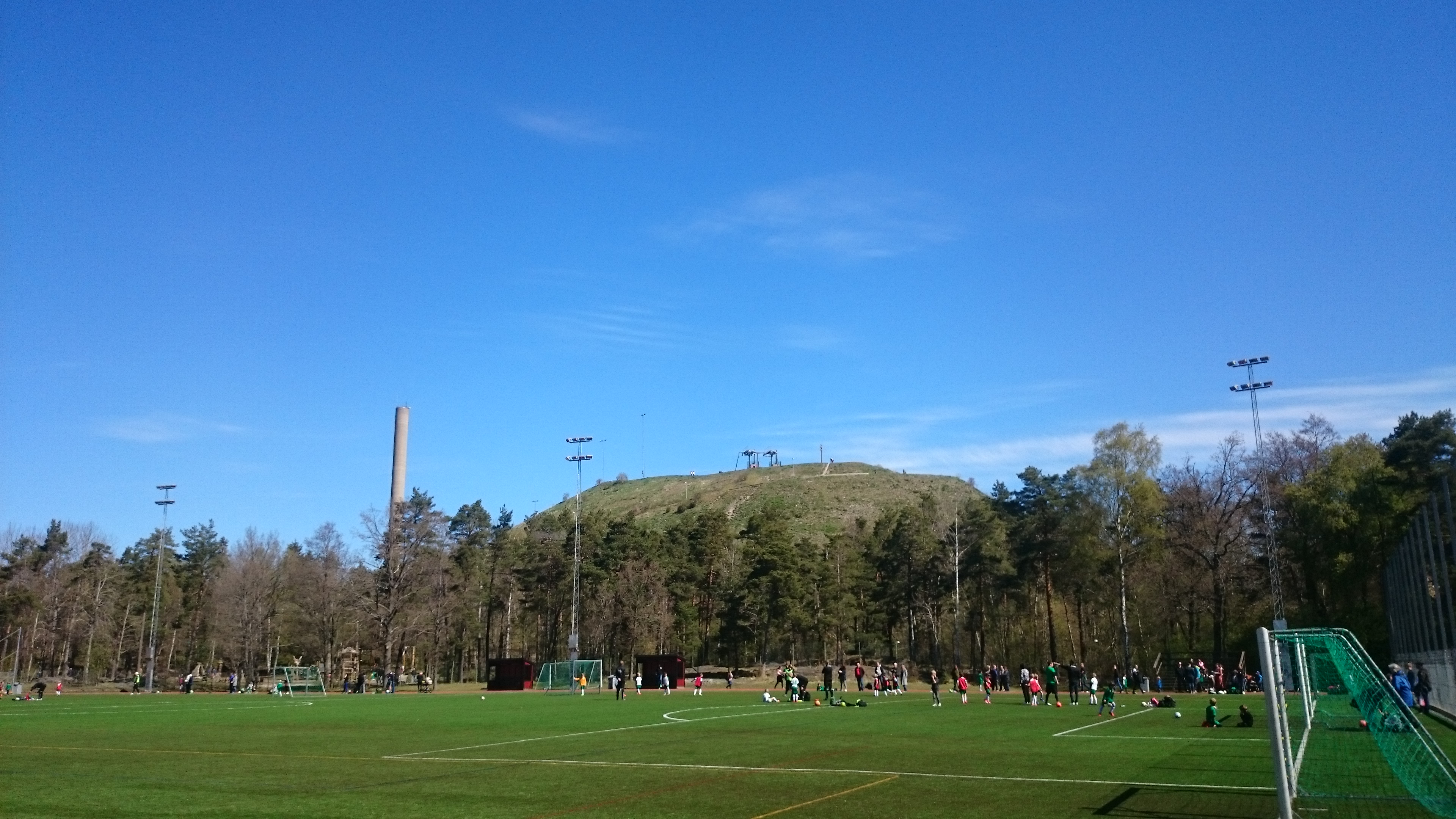 Hammarbyhöjdens IP i Johanneshov, Stockholm på Finn Malmgrens väg.